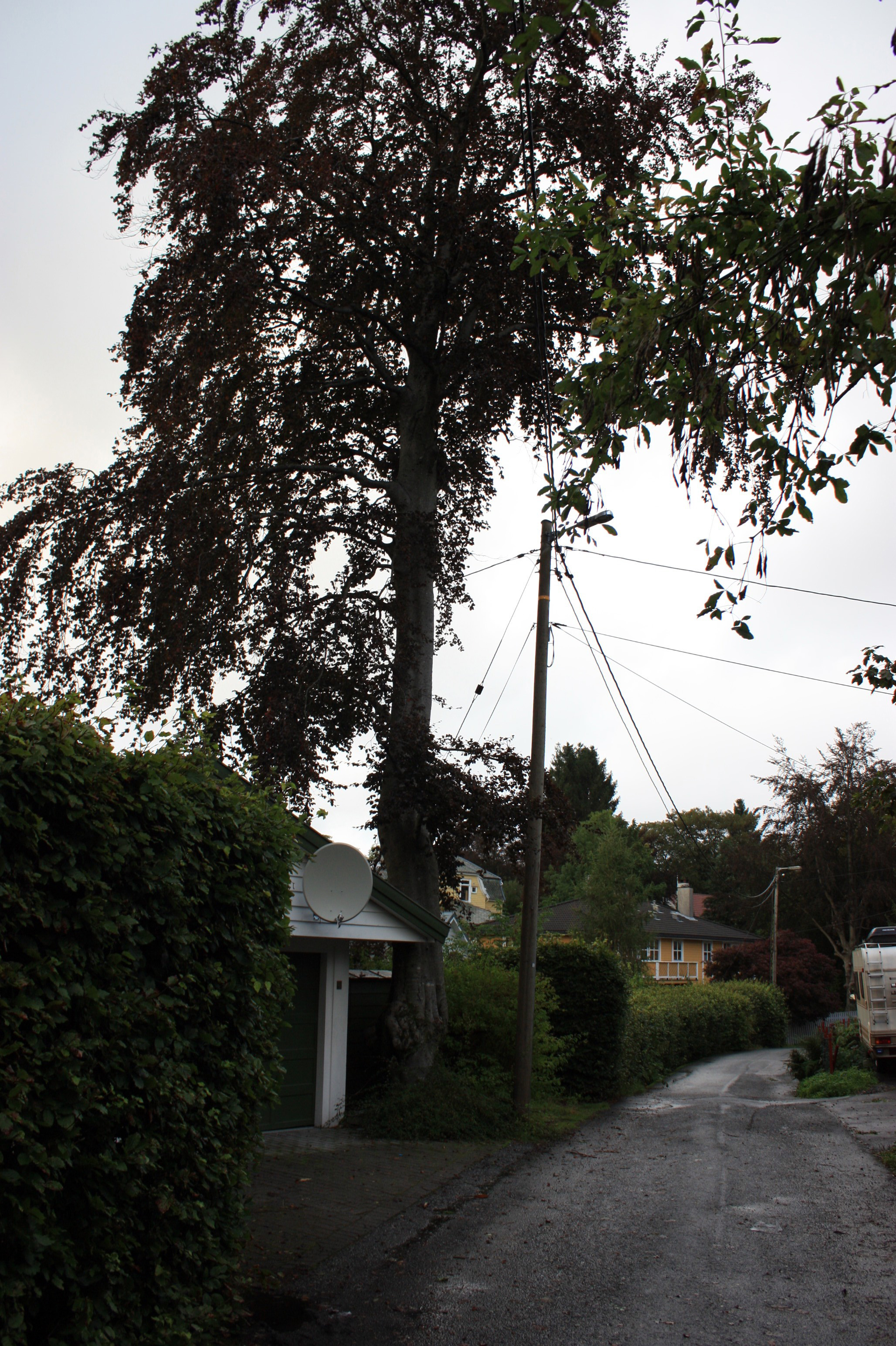 Paradisalleen, Fana, Bergen.